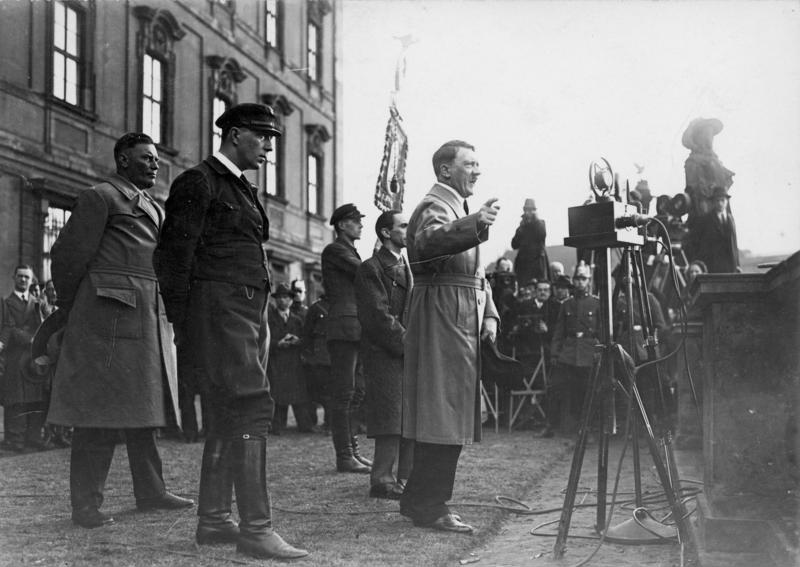 Adolf Hitler spricht im Lustgarten in Berlin zur Reichspräsidentenwahl am 4. April 1932.